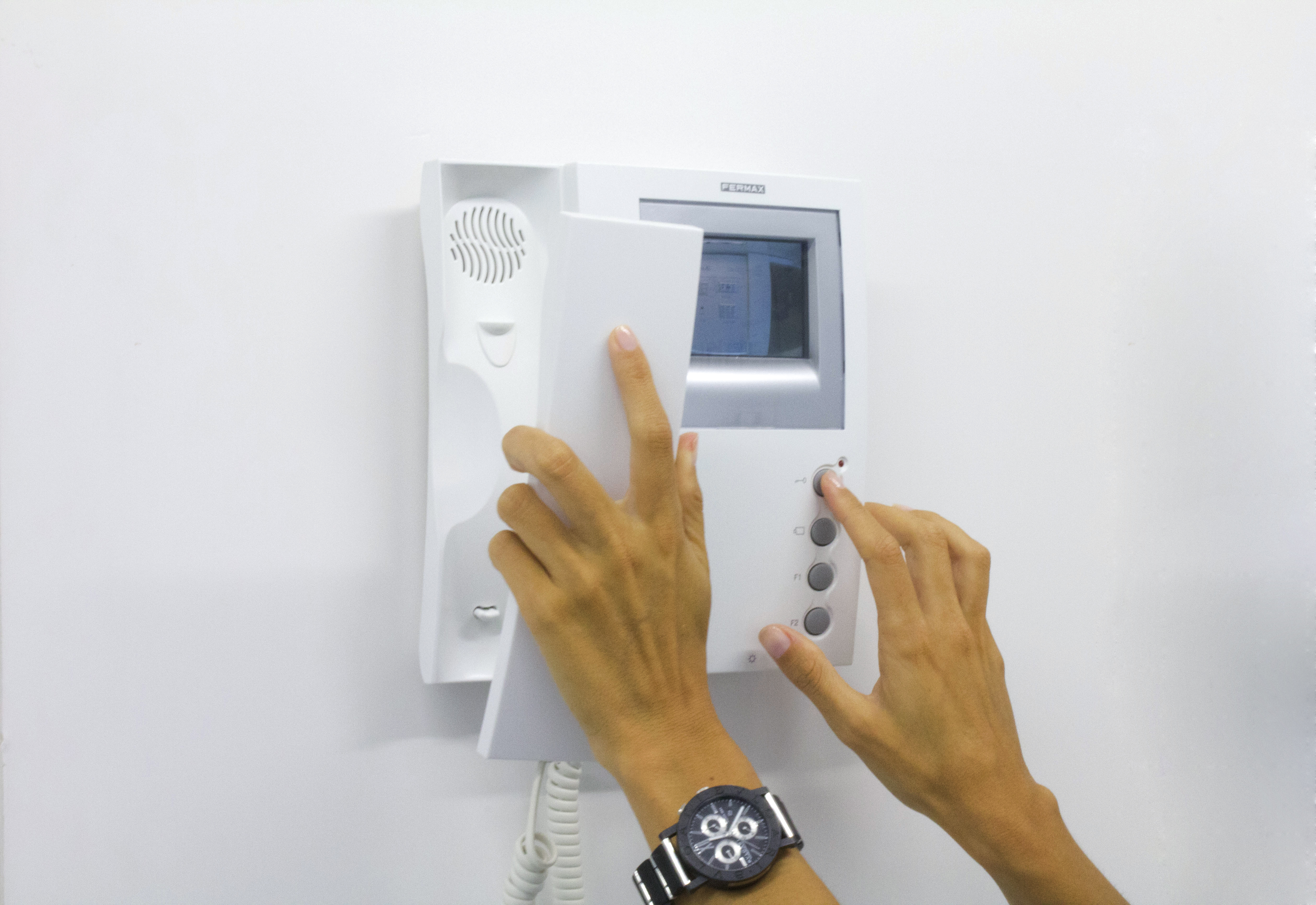 Monitor de videoportero. El dispositivo permite ver quién ha llamado, entablar conversación con la visita y abrir la puerta de la calle